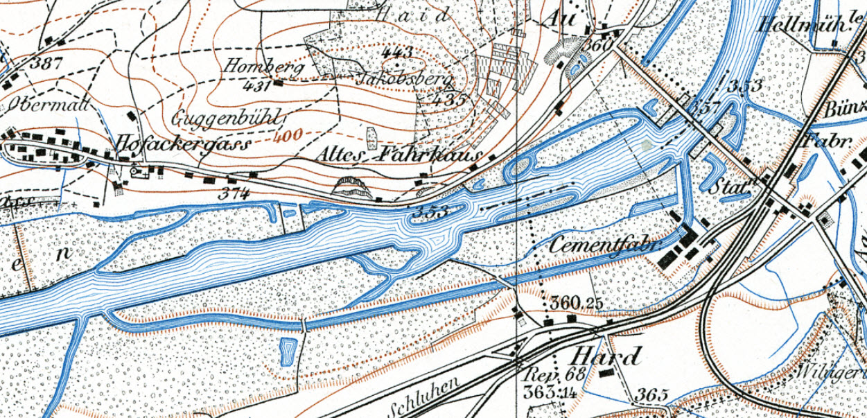 Darstellung des Kraftwerk der Zementfabrik Wildegg auf der Siegfriedkarte. Datenstand 1896